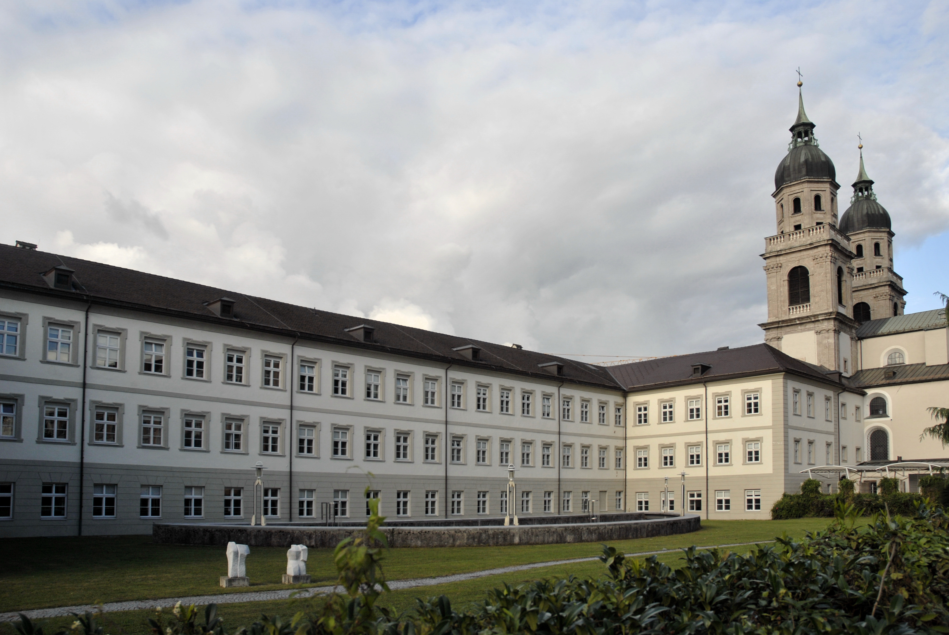 Innsbruck, Theologische Fakultät westlicher Teil